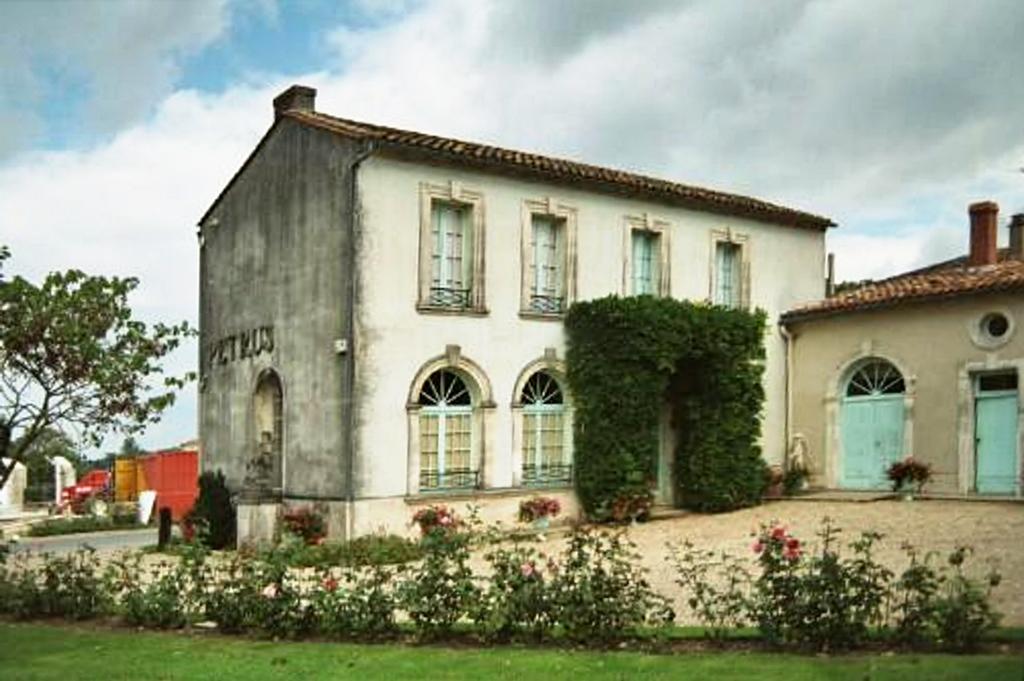 Petrus01-2